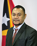 Mariano Fatubai Mota, Abgeordneter des Nationalparlaments Osttimors